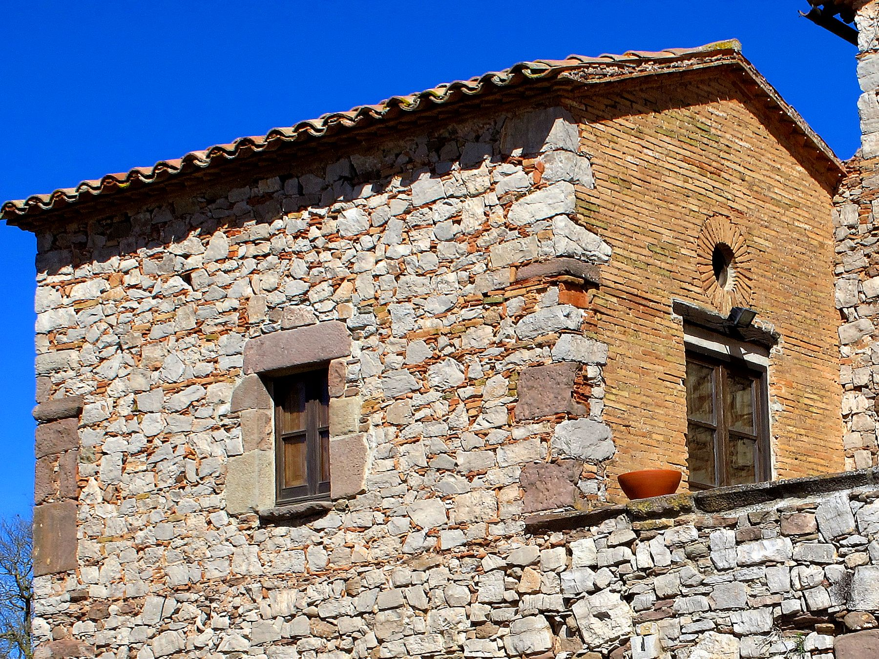 Exterior de la Capella